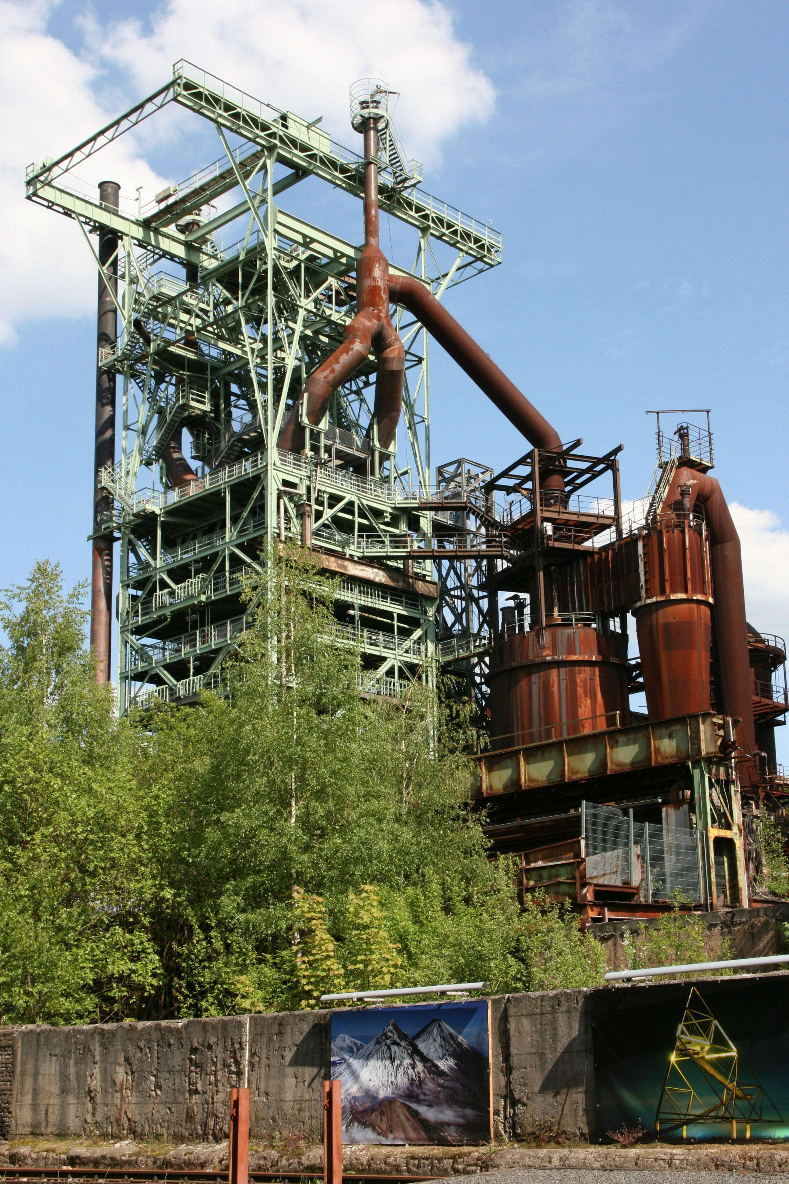 Hochofen 3 der Henrichshütte in Hattingen